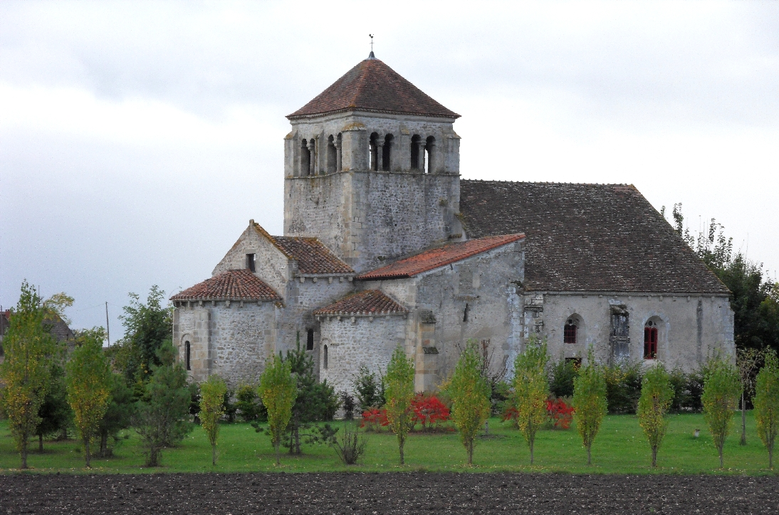 Barberier (Allier).Église Saint-André (Classé) .